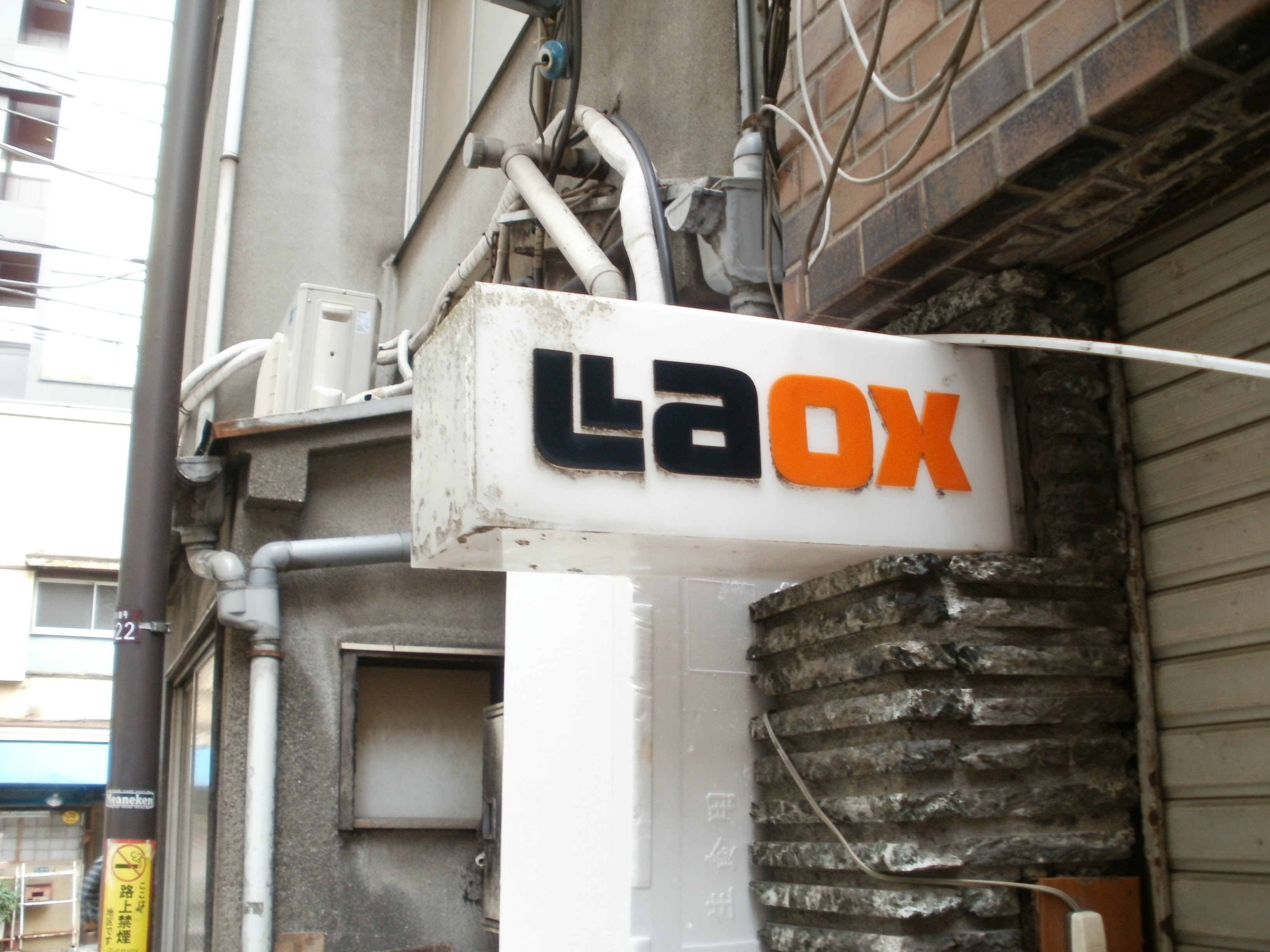 ラオックスの旧ロゴ。外神田三丁目1-14にて。